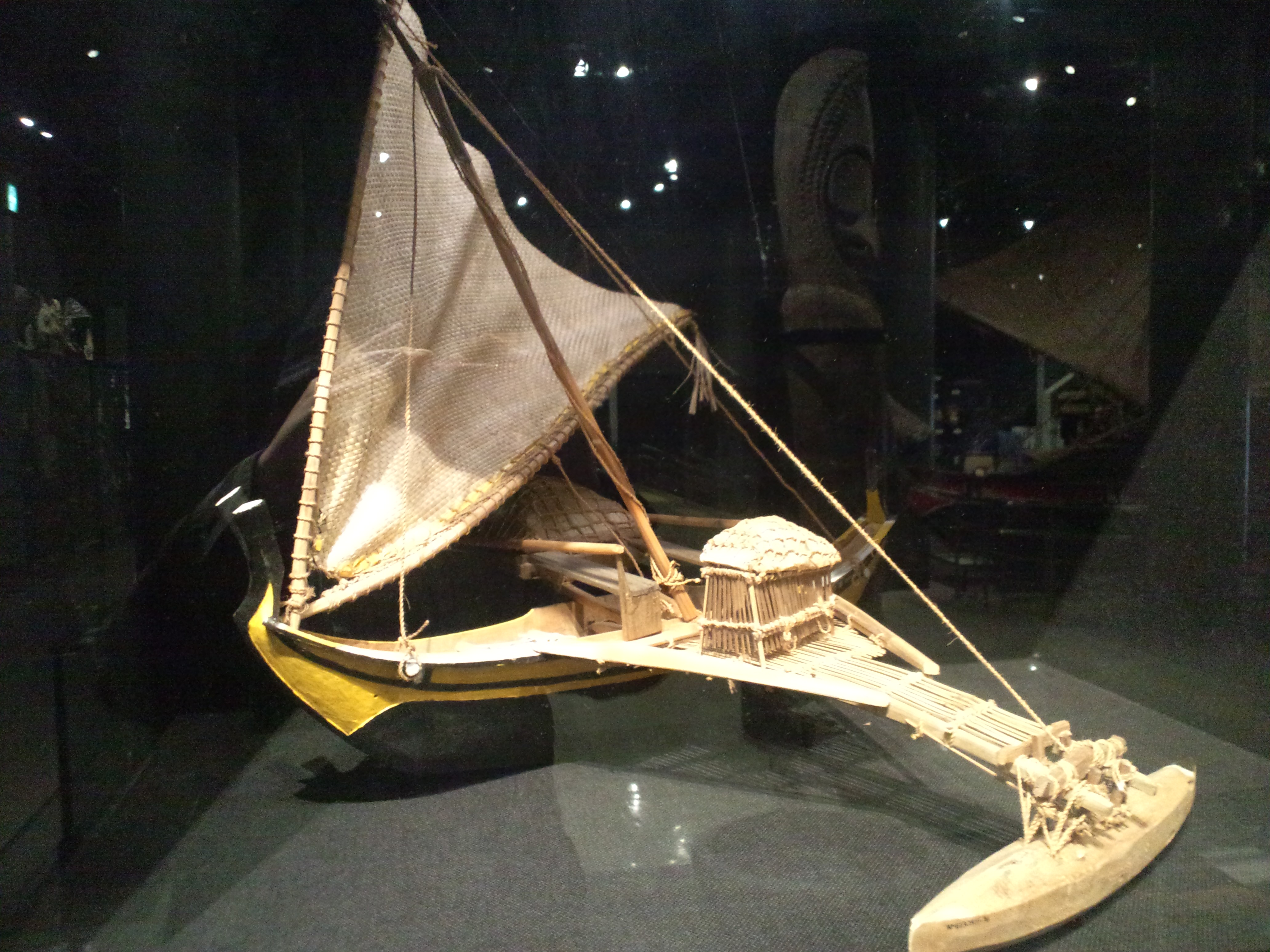 国立民族学博物館（大阪） シングル・アウトリガーカヌー（模型、ミクロネシア連邦、ウォレアイ環礁、1985年収集）